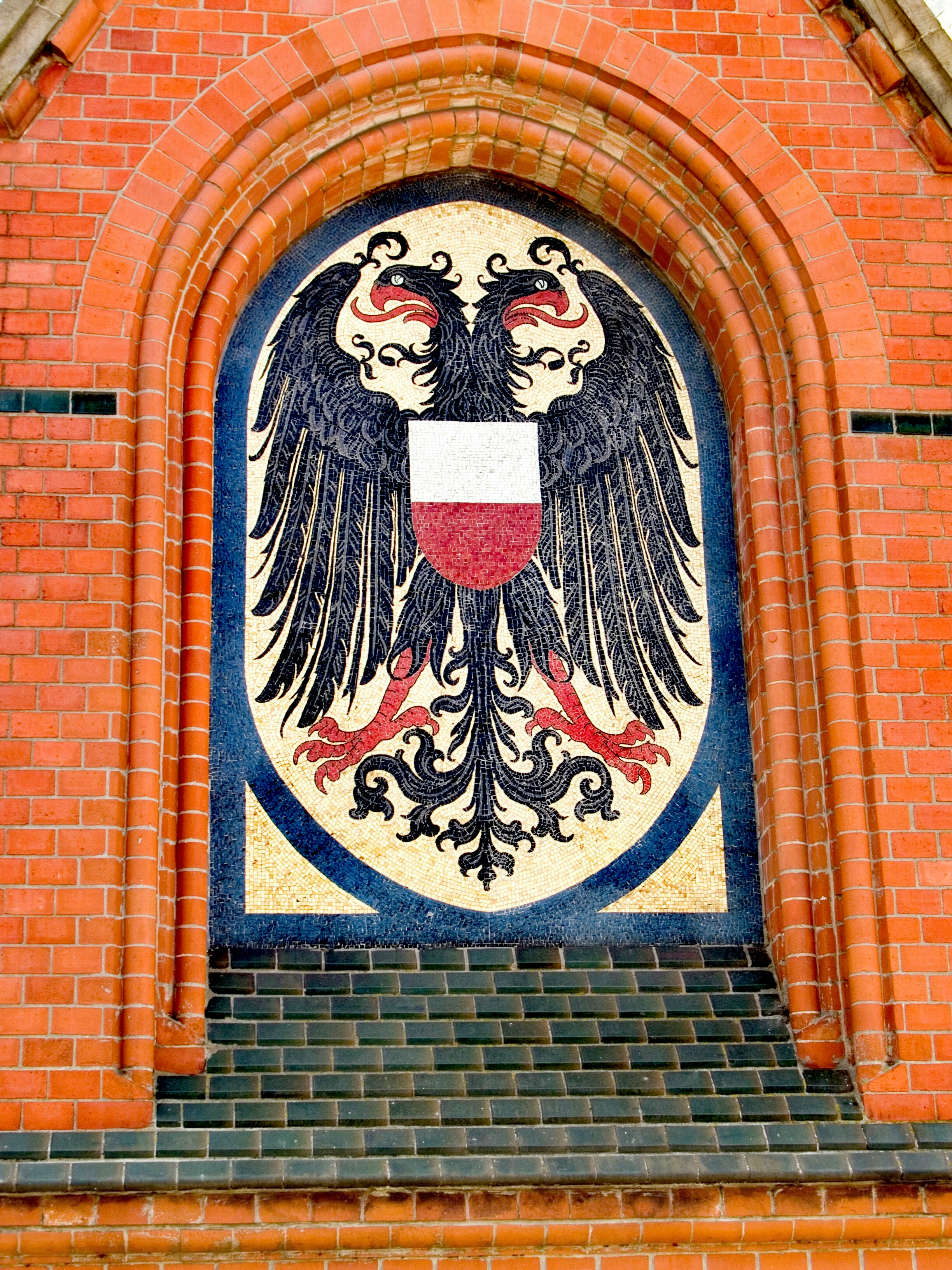 Lübecker Wappen, Mosaik am Turm der Hubbrücke (Lübeck)